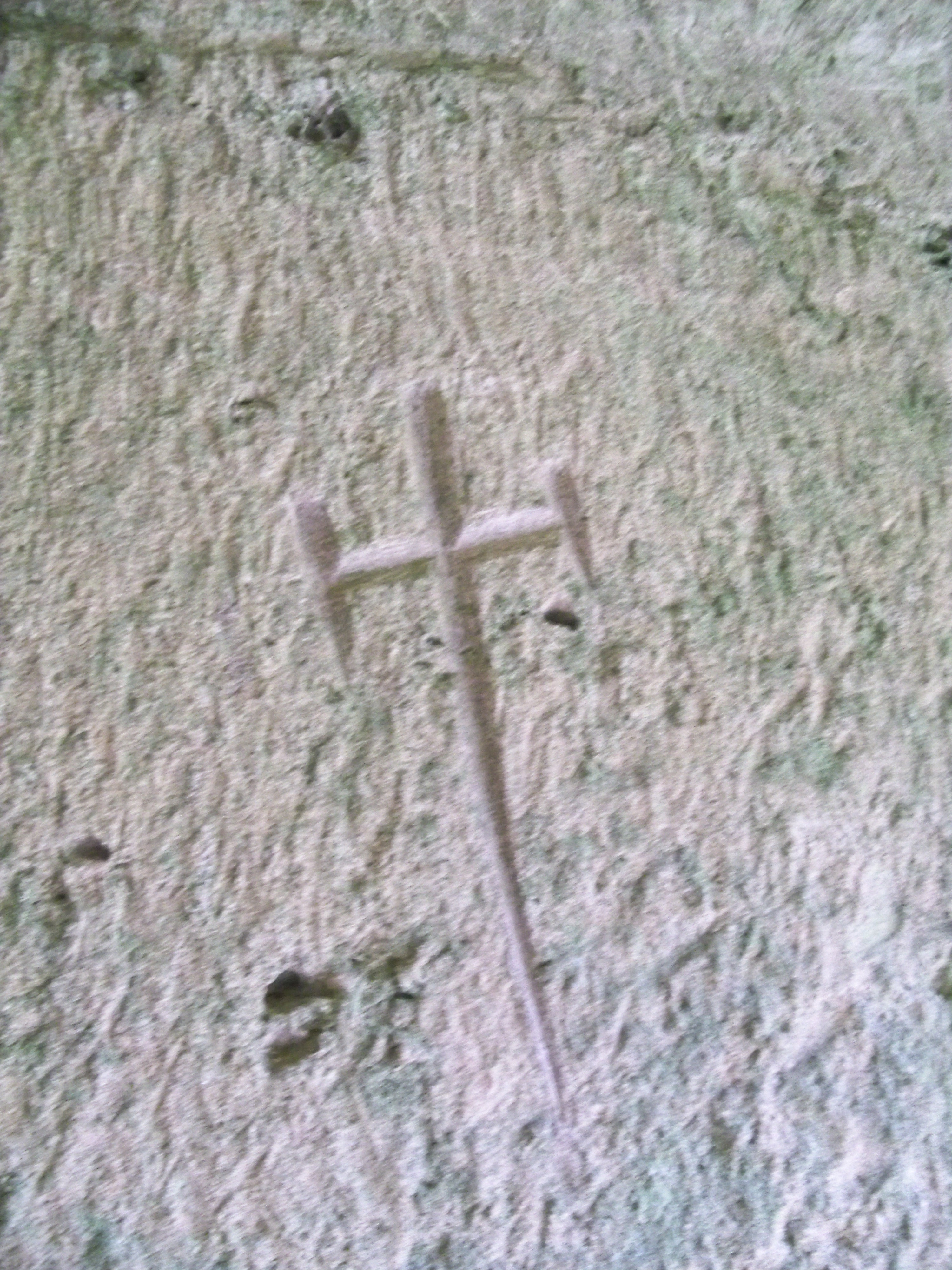 croix gravée au Prieuré de Carluc, à Céreste, Alpes de Haute Provence, France